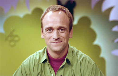 Hans Ligtvoet